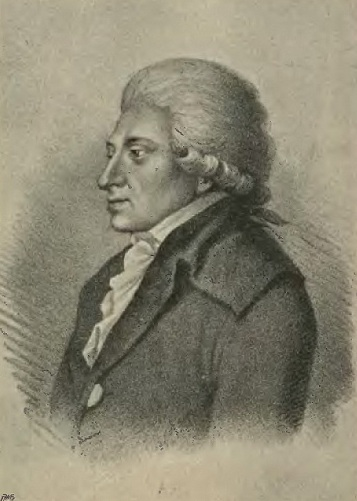 Wincenty de Lesseur